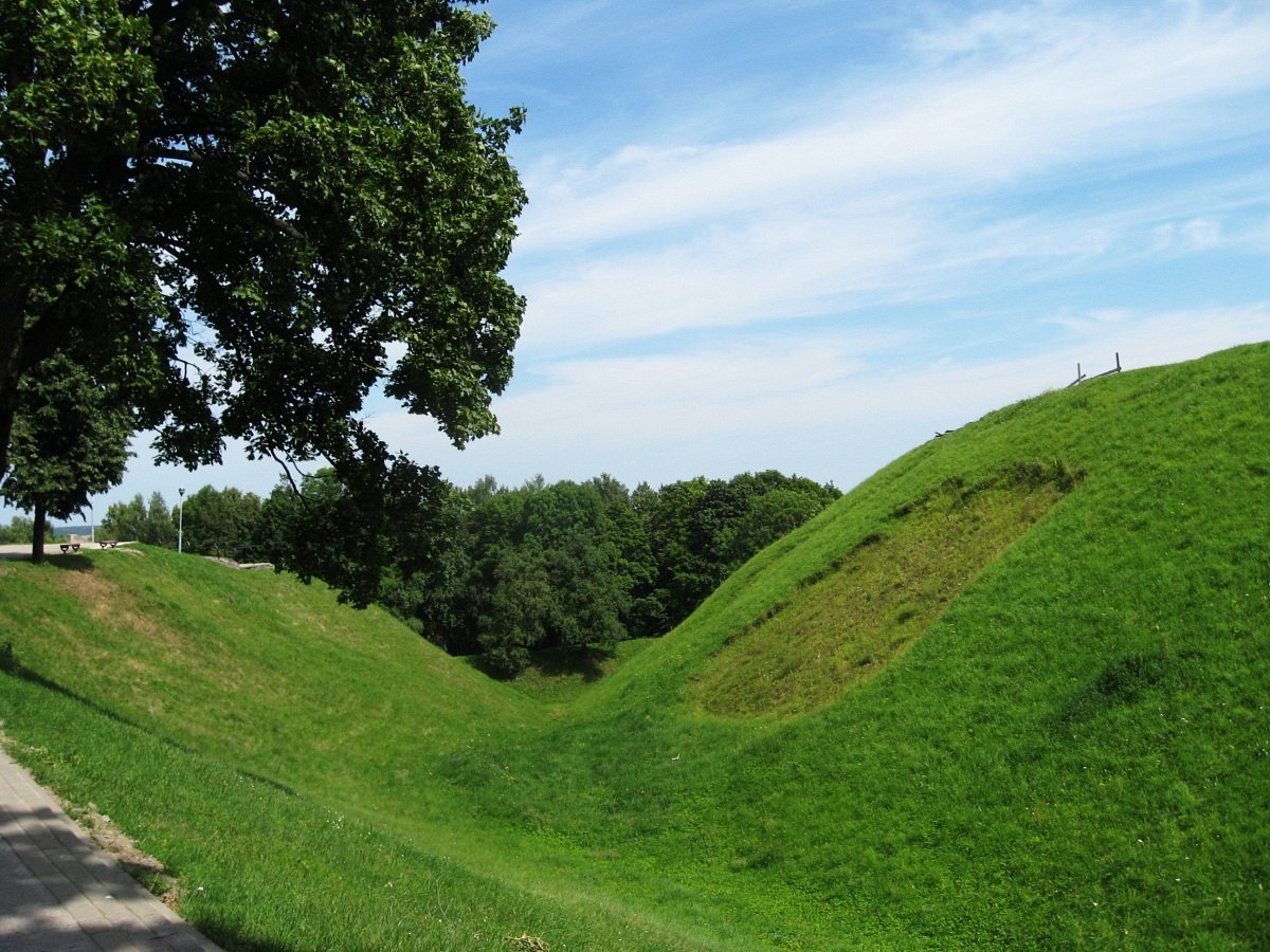 Навагрудак. Роў паміж Замкавай гарой і Малым замкам